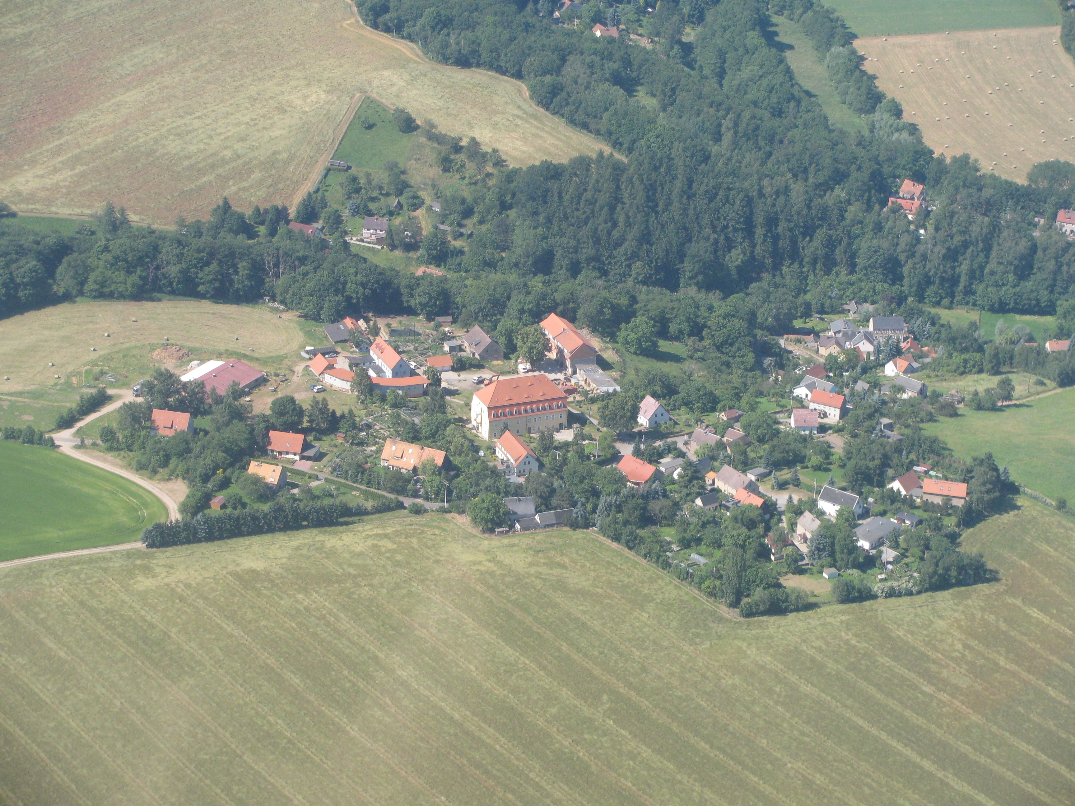 Luftbild Munzig, Triebischtal